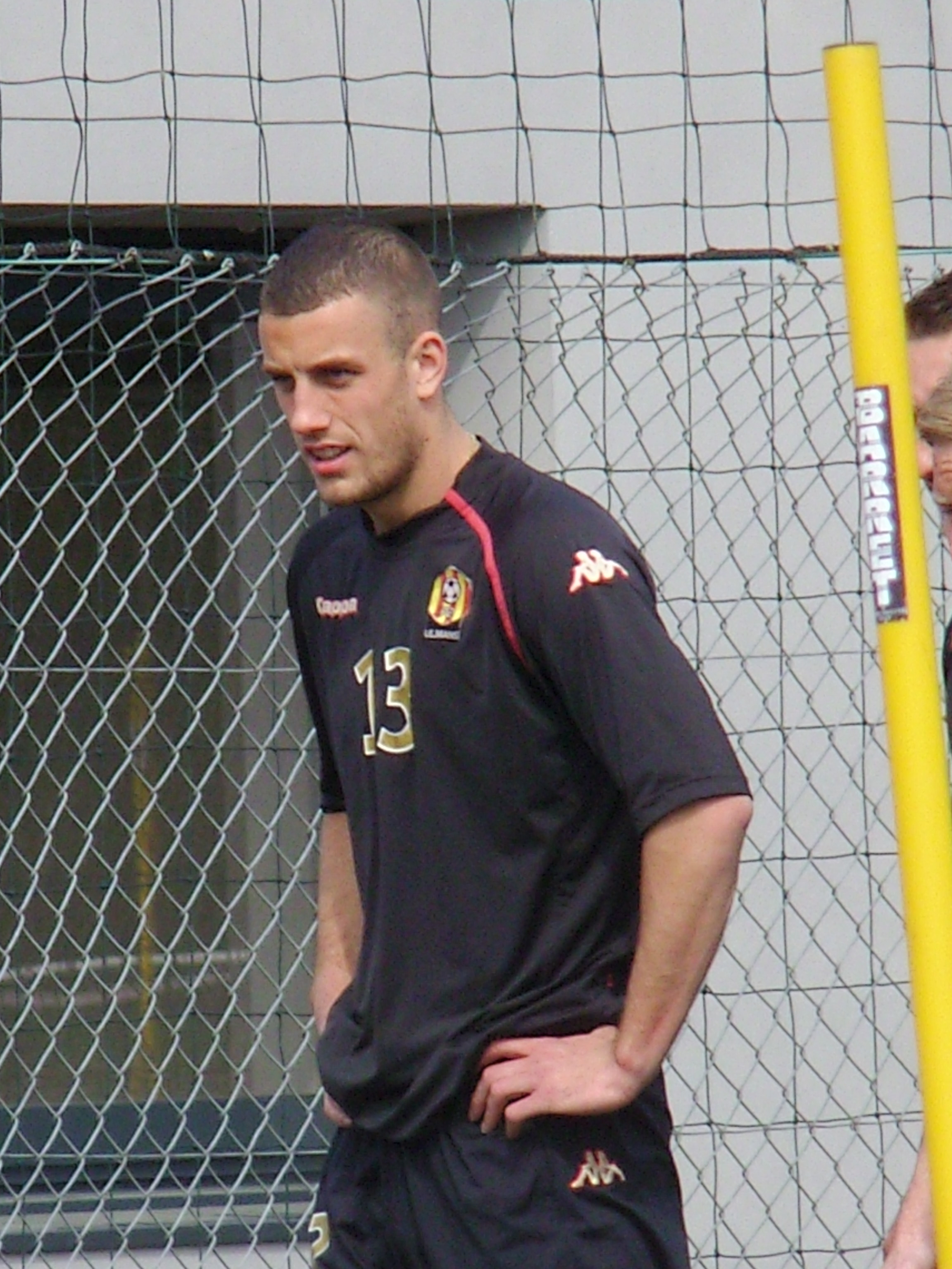 Cyriaque Louvion à l'entrainement au centre de La Pincenardière au Mans.